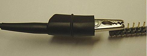 crocodil clip